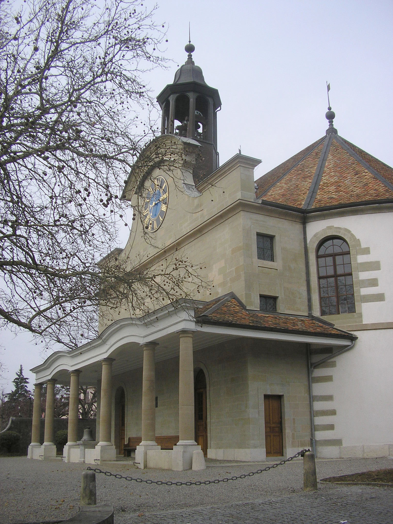 Temple de Chêne-Bougeries, bâti en 1758, de forme elliptique. Bien culturel d'importance nationale.